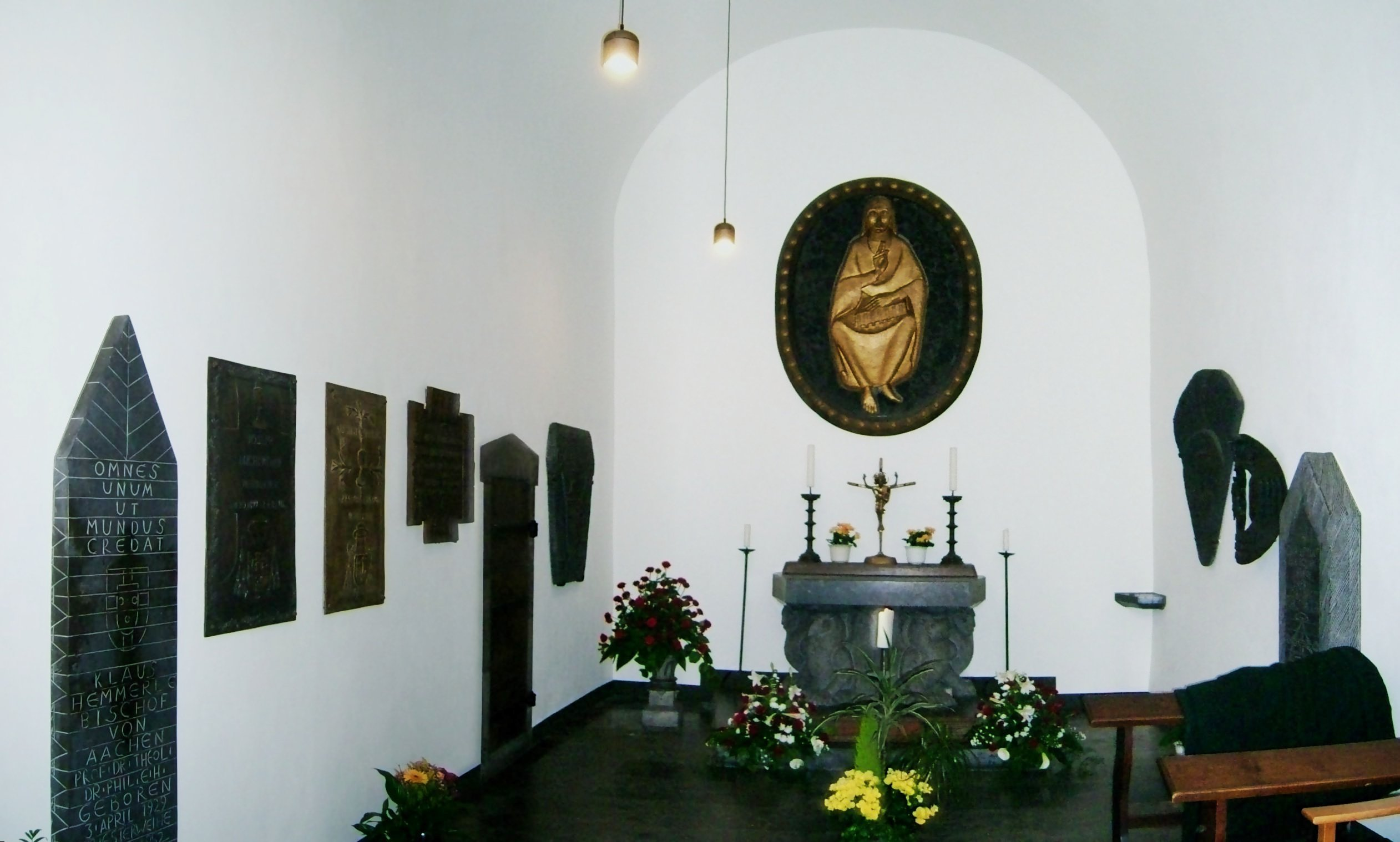 Moderne Kapelle im Aachener Dom